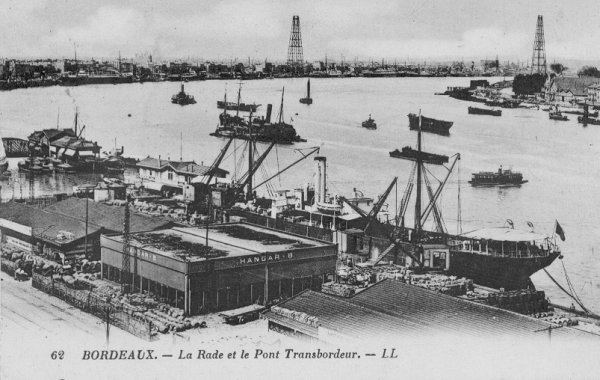 Vue du port de la Lune à Bordeaux avec les pylônes du pont transbordeur.